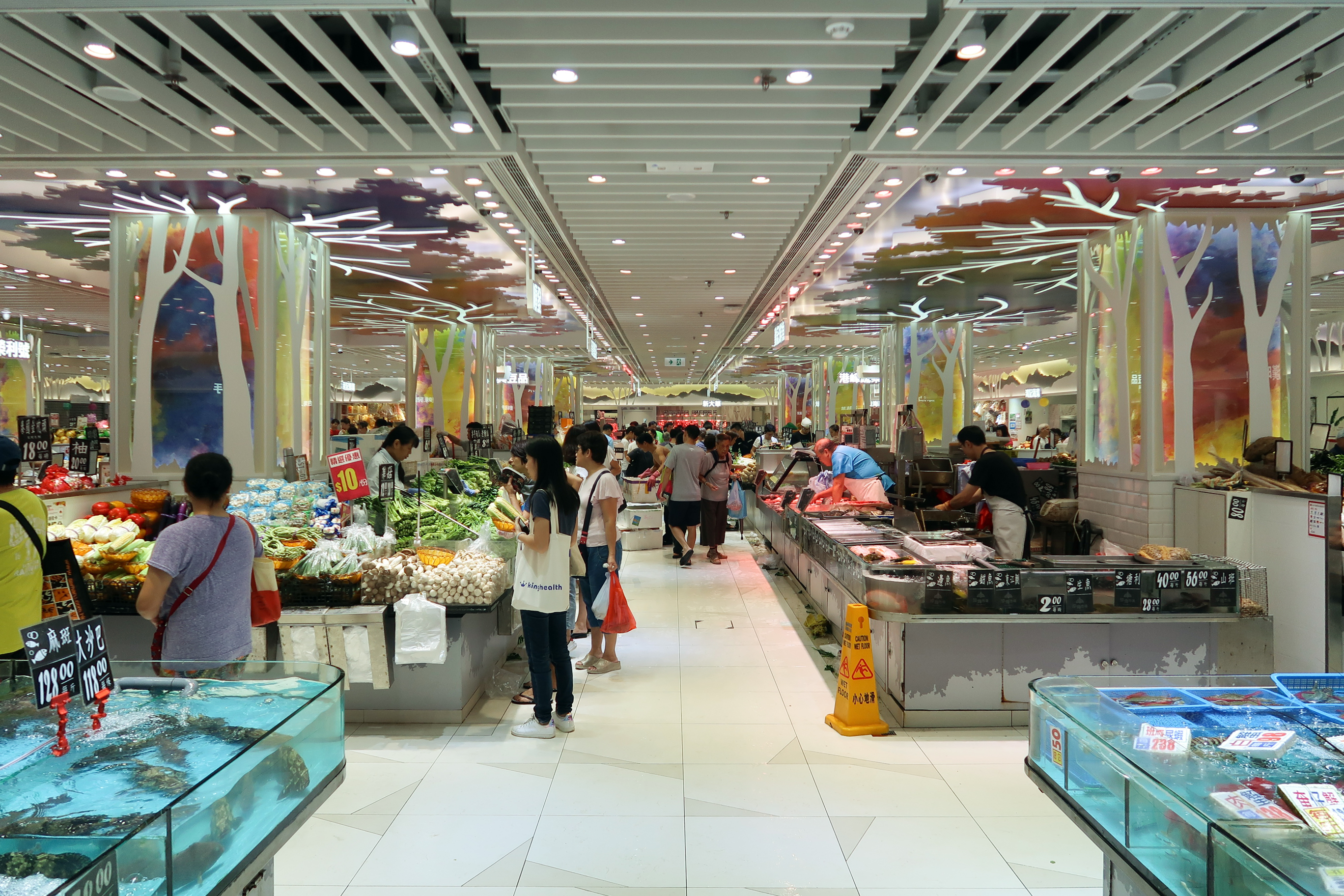 Sha Kok Estate Freshall Market